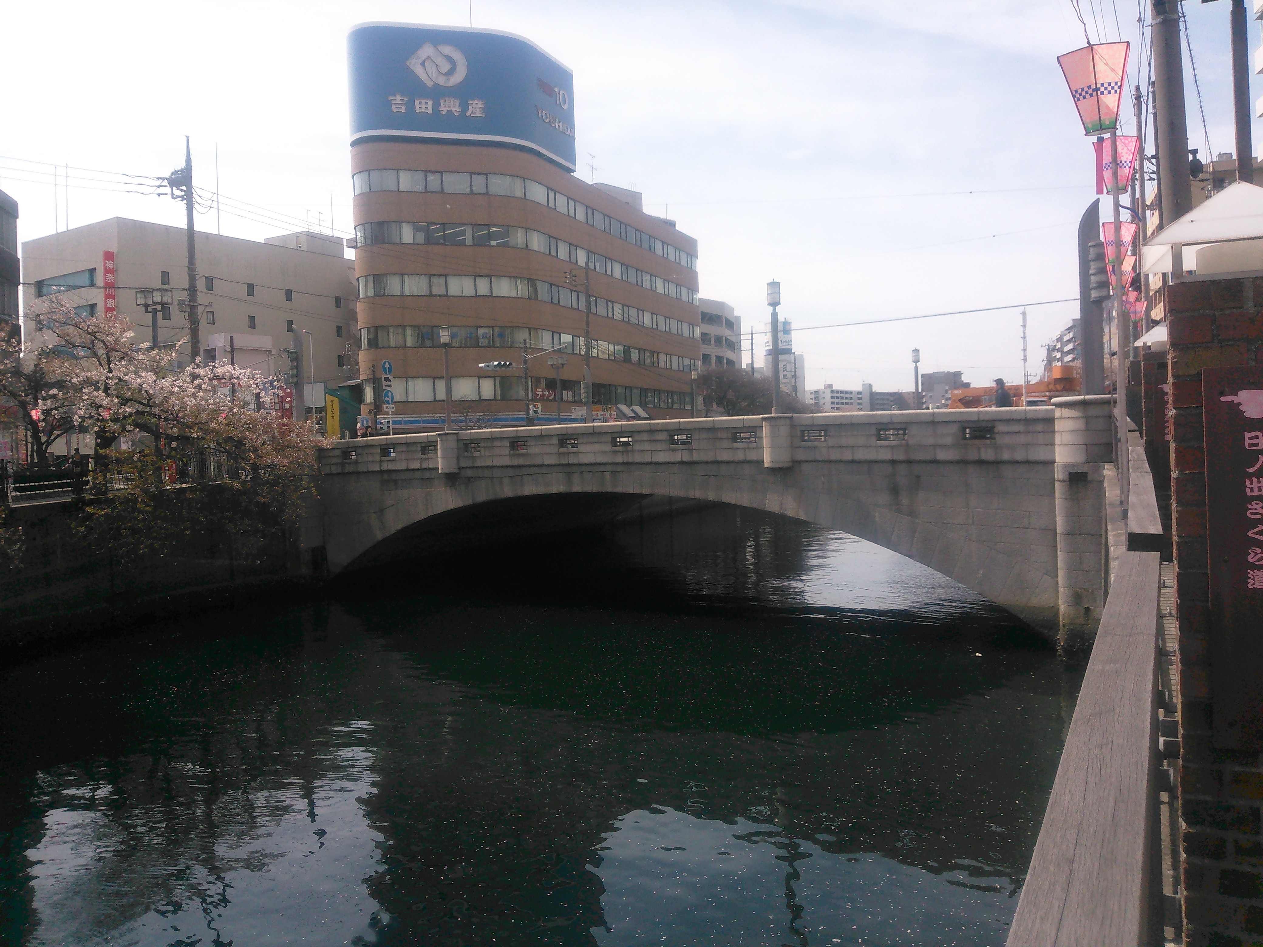 大岡川に架かる長者橋。左岸の日ノ出町1丁目から上流（南西）方向を見る。